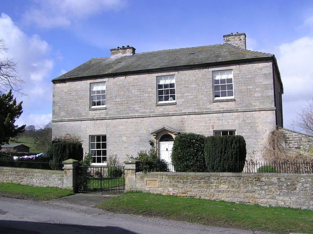 Gayles House, nr Gayles